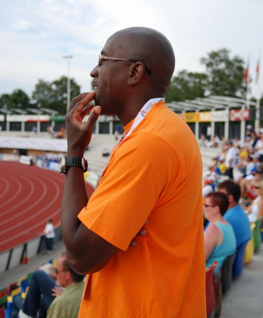 Troy Douglas tijdens EK junioren 2007